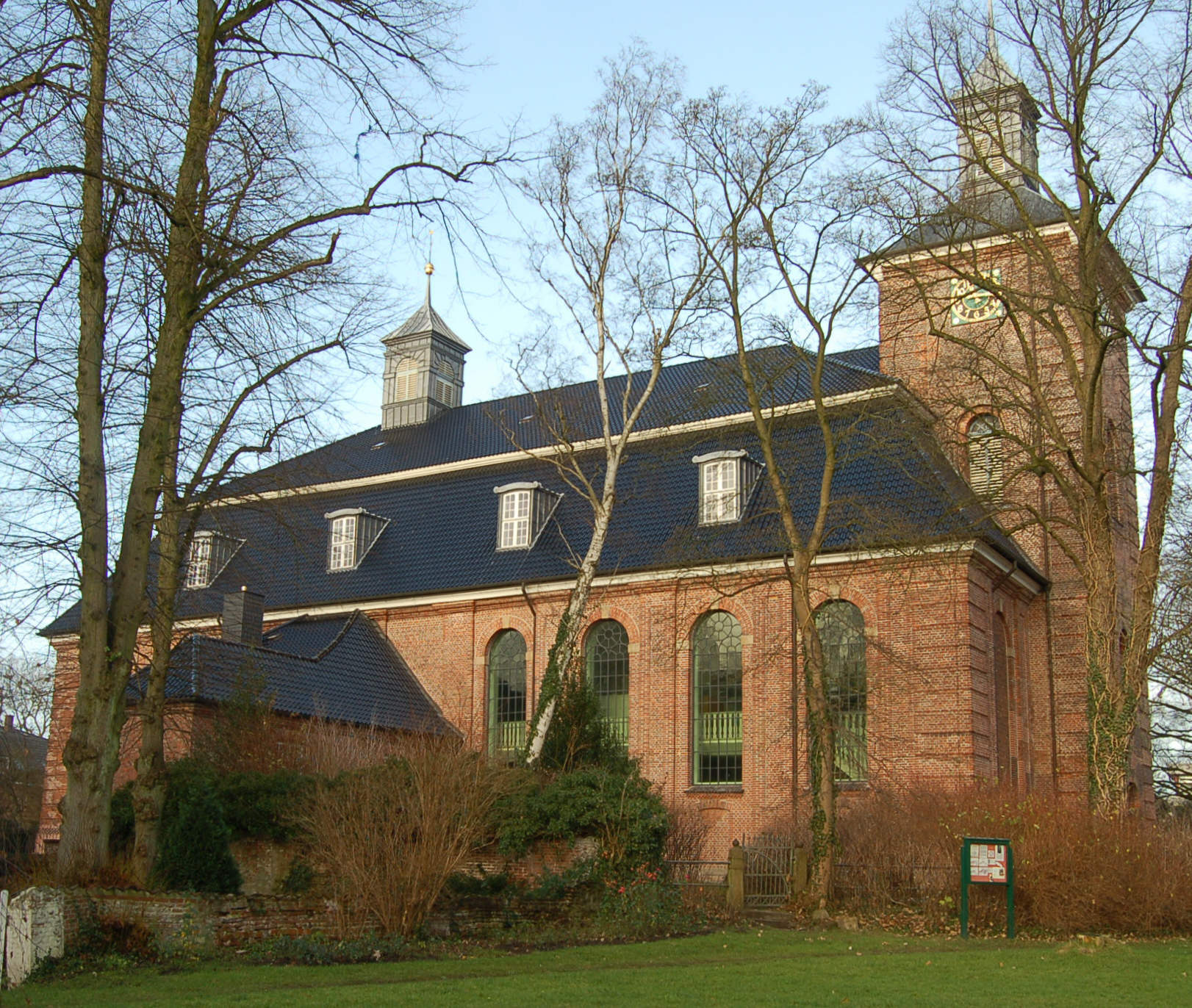 Die Klosterkirche in Uetersen Baujahr 1747/49